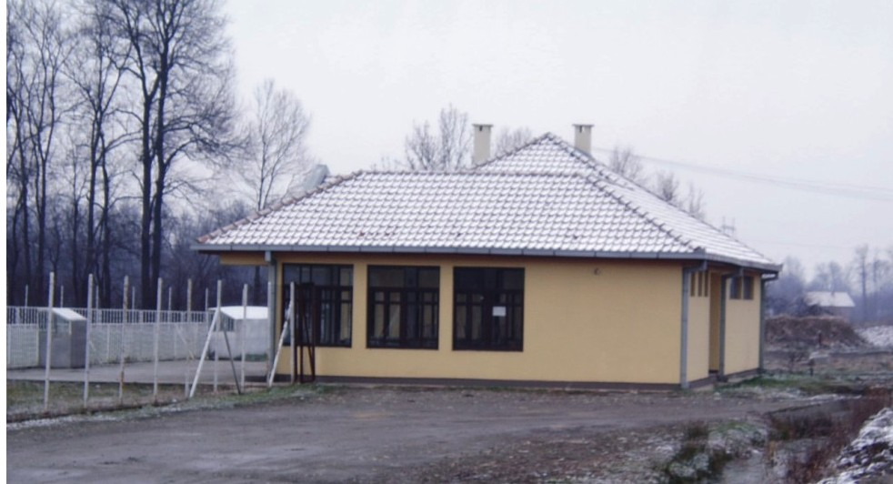 Школа у Каленићу.